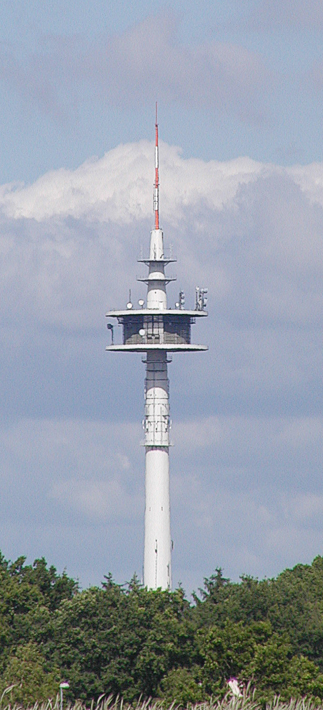 Der Funkturm Stade Haddorf